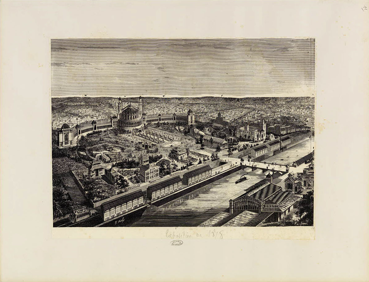 Exposition universelle de 1878. Gravure de P. Avril représentant le Palais du Trocadéro et les pavillons construits le long de la Seine.